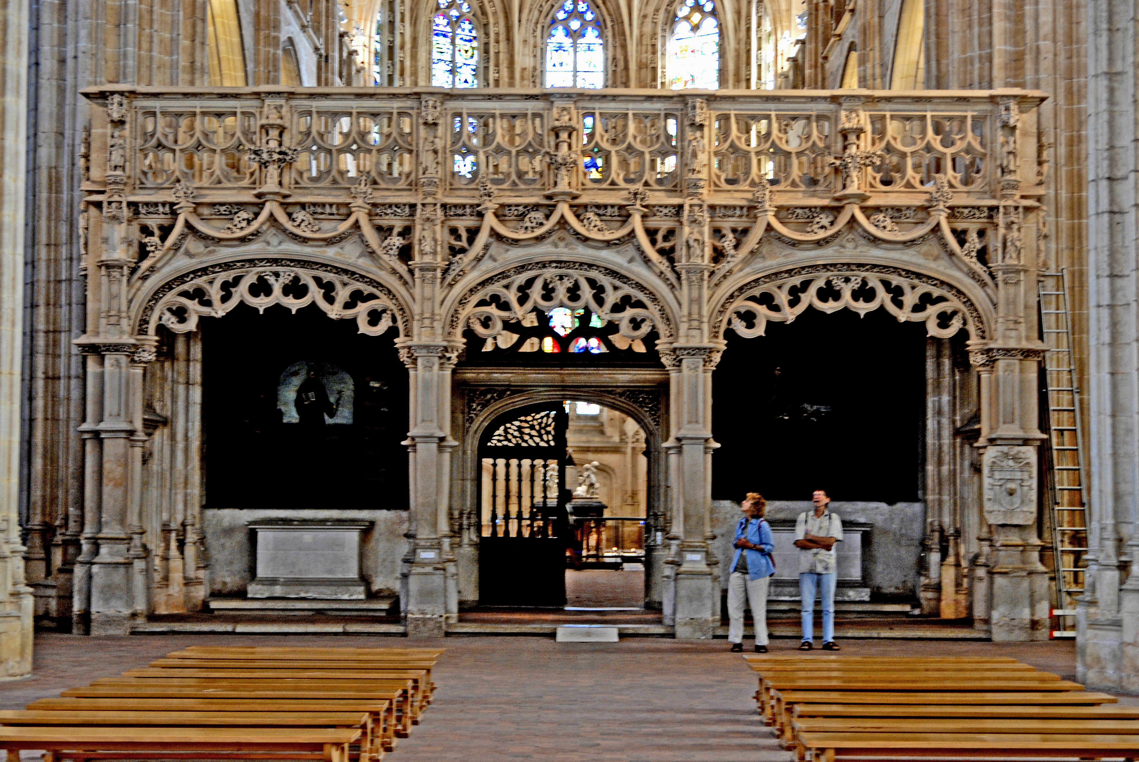 Abteikirche Brou, steinerner Lettner